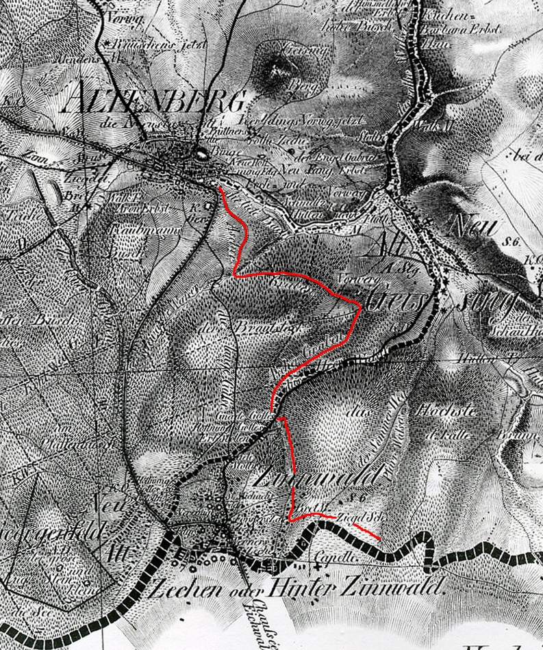 Das Bild zeigt den Verlauf des Aschgrabens zwischen Zinnwald und Altenberg. Der 7 km lange Graben ist eine der ältesten erhaltenen Anlagen der bergmännischen Wasserwirtschaft im Erzgebirge.